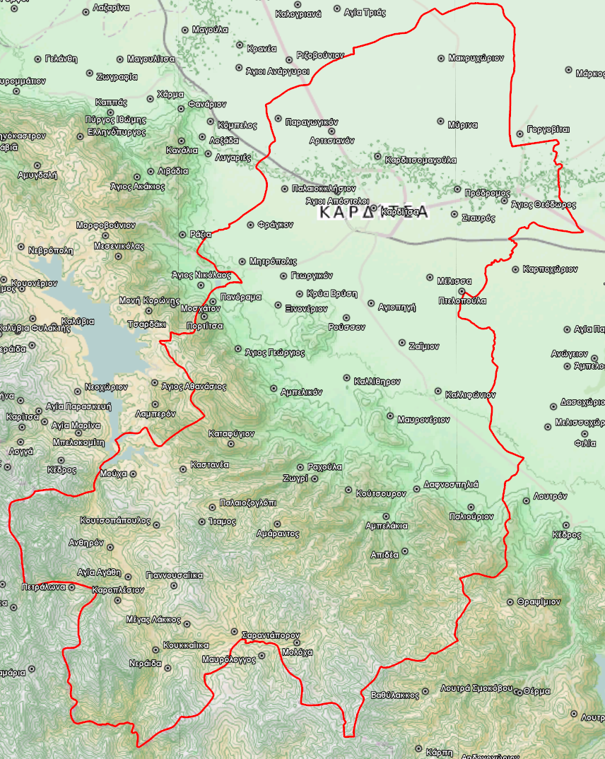 Τοπογραφικός χάρτης του Δήμου Καρδίτσας